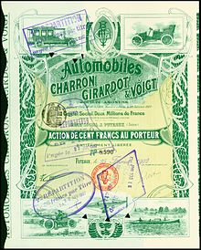 Automobiles Charron, Girardot & Voigt logo